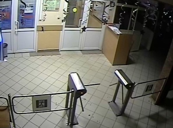 Вход в здание школы № 263 (Москва) изнутри по состоянию на январь 2016 года.